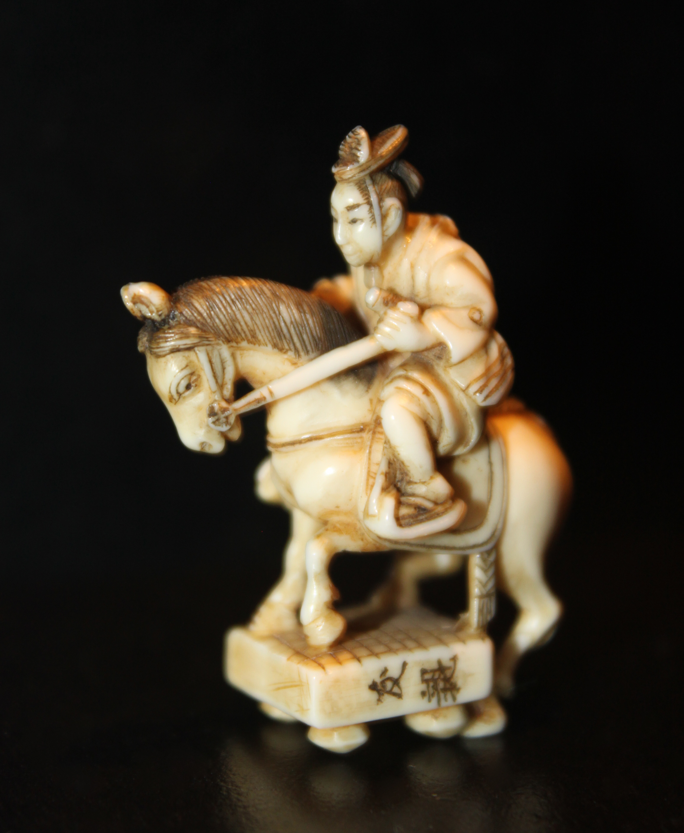 Samurajen Oguri Hangan (1398-1464) förknippas med en känd legend. Han hade en kärleksaffär med prinsessan Terute vars familj motsatte sig hennes giftemål med Oguri och sammansvärjde för att döda Oguri. De bad Oguri rida en vildhäst, men eftersom han var väl insatt i ridkonst lyckades han både sitta kvar och få den att utföra konster som att stå på en go-bräda med alla fyra hovarna ihop och att kliva upp på en stege. Han gifte sig med prinsessan och både Oguri Hangan och Terute blev hjältar i många kabuki- och dockteaterpjäser. Tomochika. Miniatyrskulptur (netsuke). Elfenben. 1800-talets mitt. This is a photo of an artwork at the Museum of Far Eastern Antiquities in Sweden with the identifier: NM-1944-0110